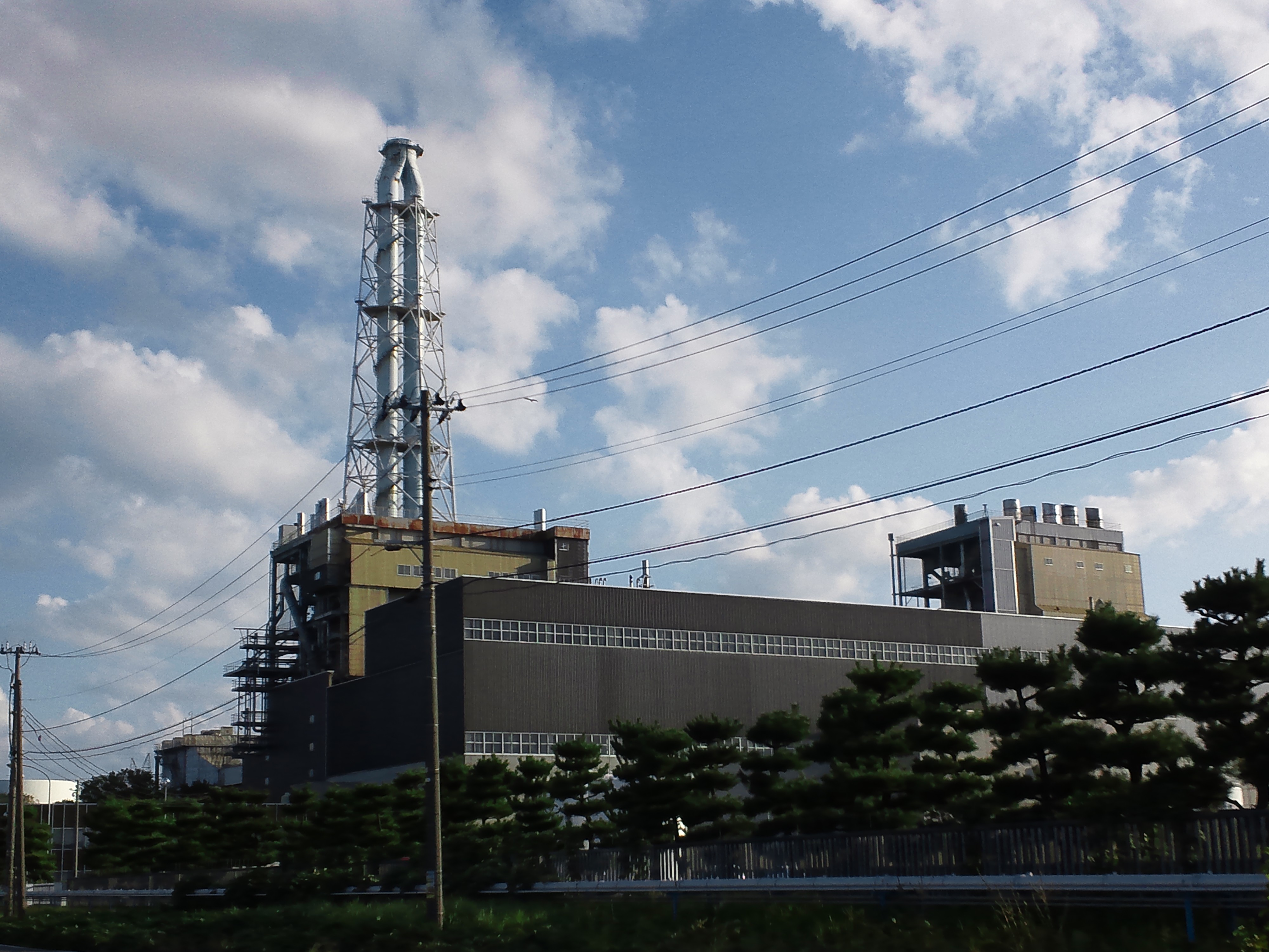 東北電力東新潟火力発電所 港1、2号機